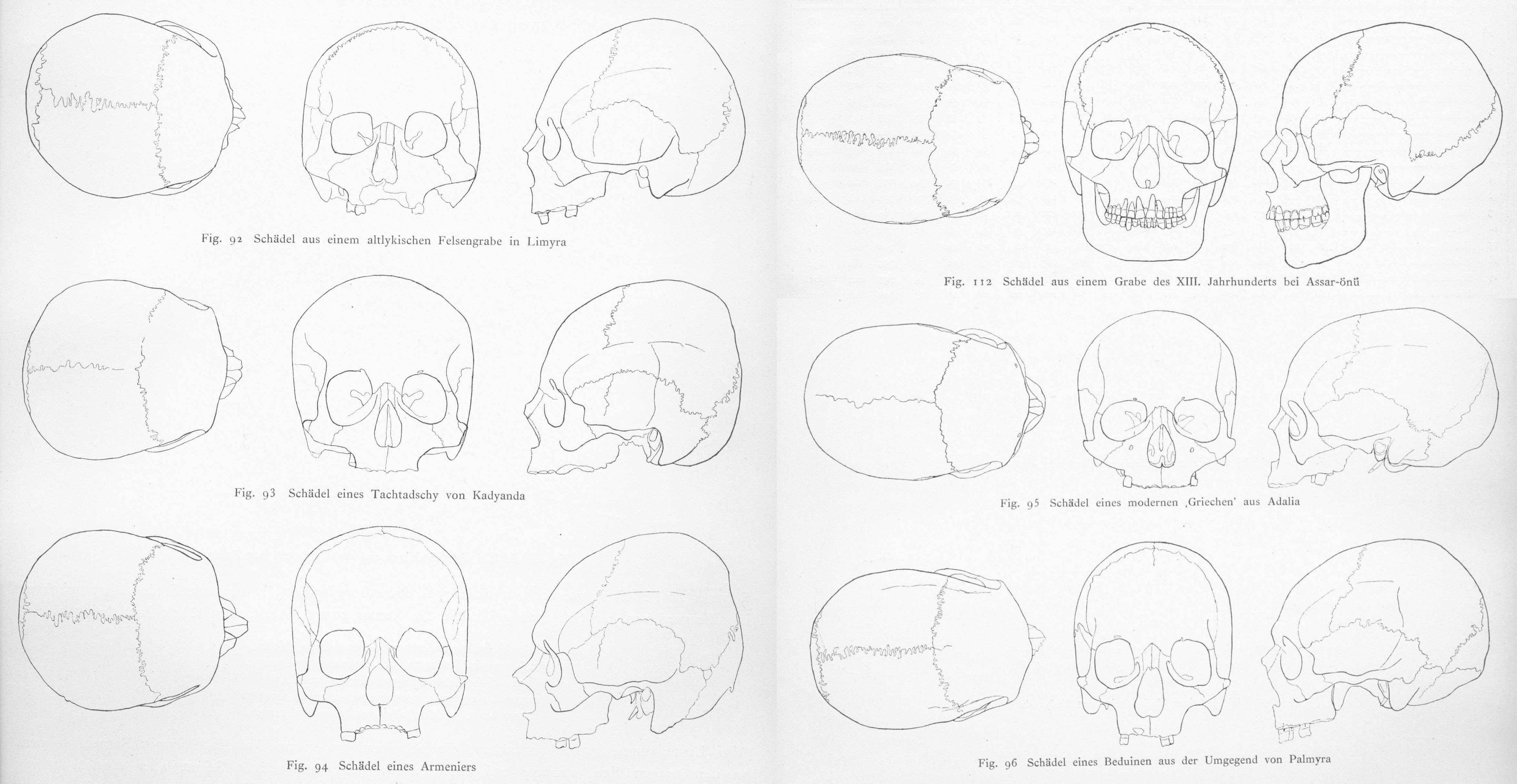 Vergleich kurzköpfiger (brachycephalider) und langköpfiger (dolicholcephalider) Schädel rezenter und antiker Ethnien: Fig. 92: Schädel aus einem altlykischen Felsengrabe in Limyra Fig. 93: Schädel eines Tachtadschy aus Kadyanda Fig. 94: Schädel eines Armeniers Fig. 95: Schädel eines modernen "Griechen" aus Adalia Fig. 96: Schädel eines Beduinen aus der Umgegend von Palmyra Fig. 112: Schädel aus einem Grabe des XIII. Jahrhunderts bei Assar-önü